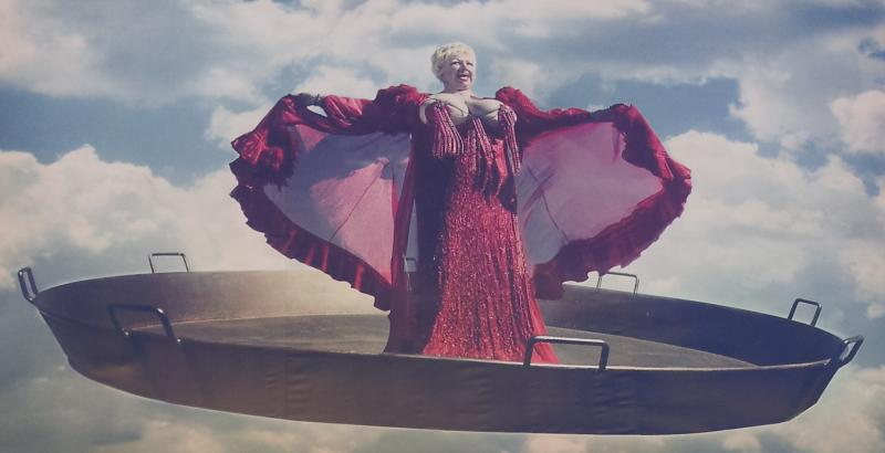 La famosa paella.